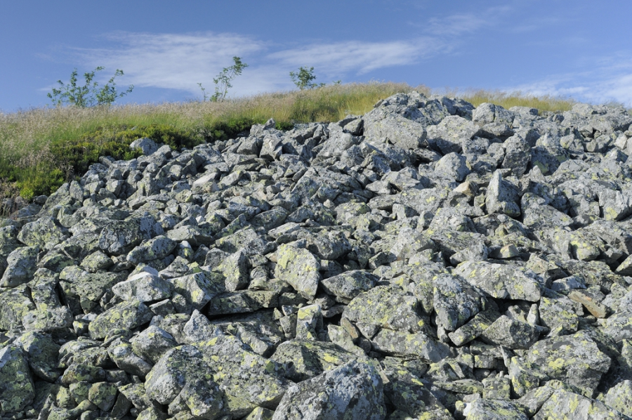 Vue d'un chirat